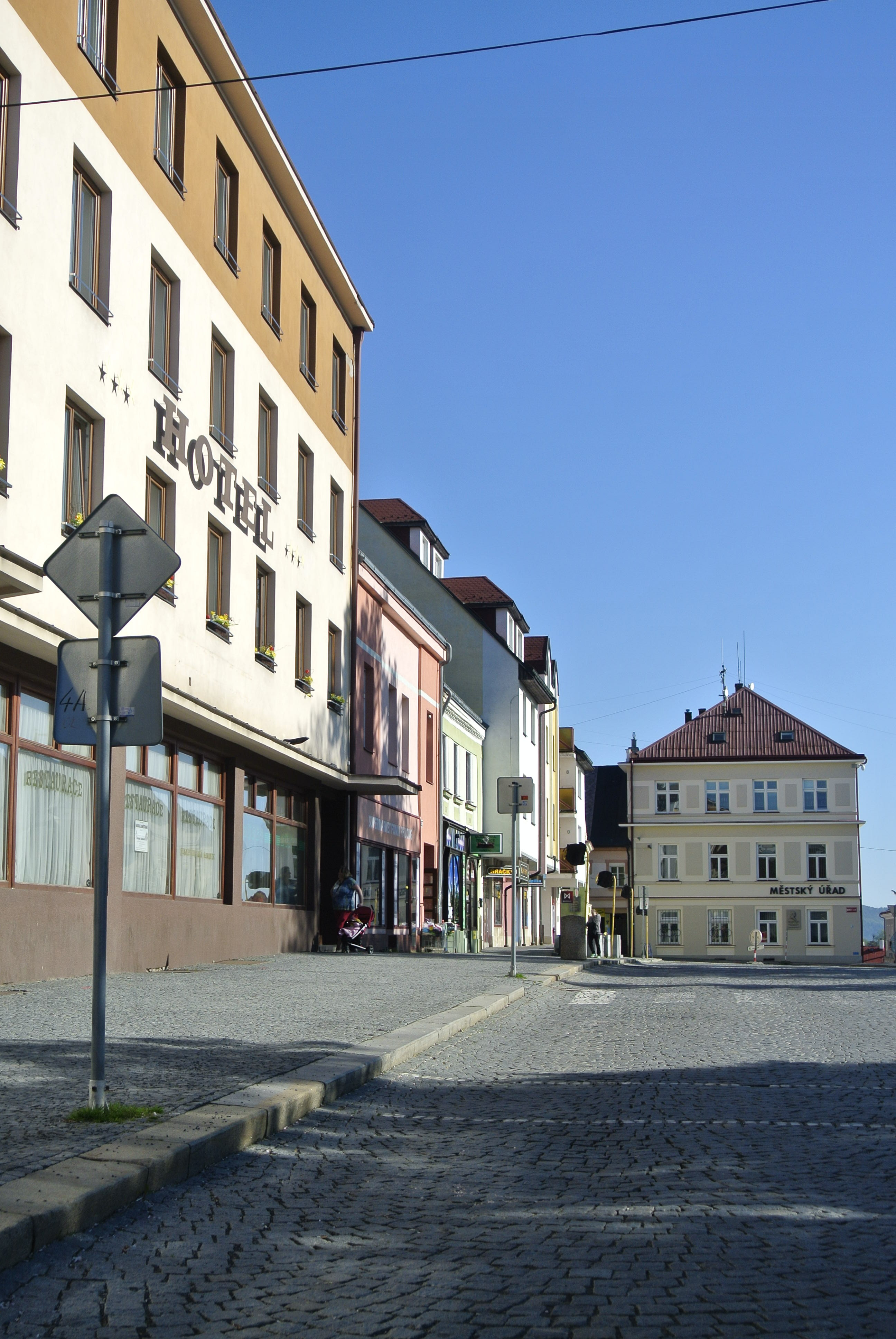 náměstí T. G. Masaryka v Chotěboři, západní uliční fronta